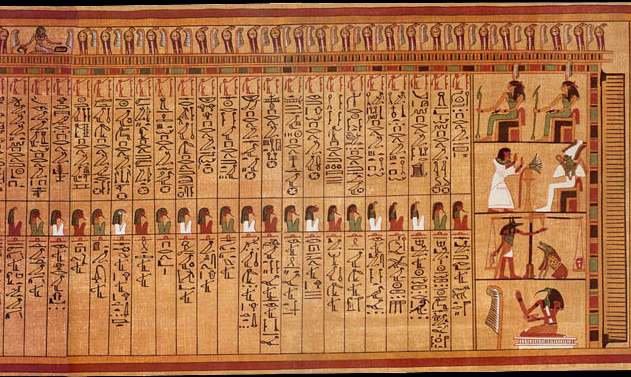 chapitre 125 du livre des morts du papyrus d'Ani